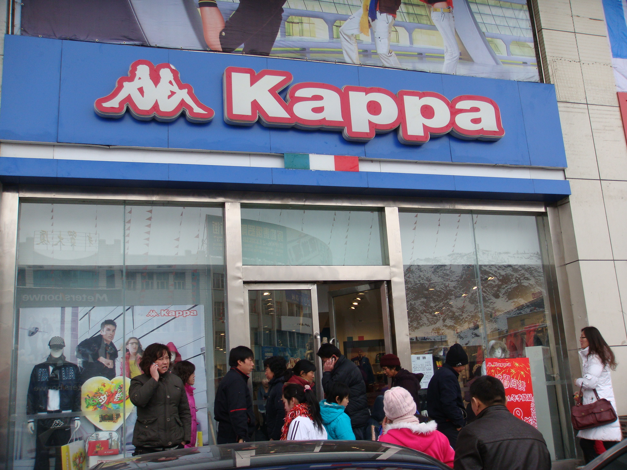 kappa 名店 余华峰